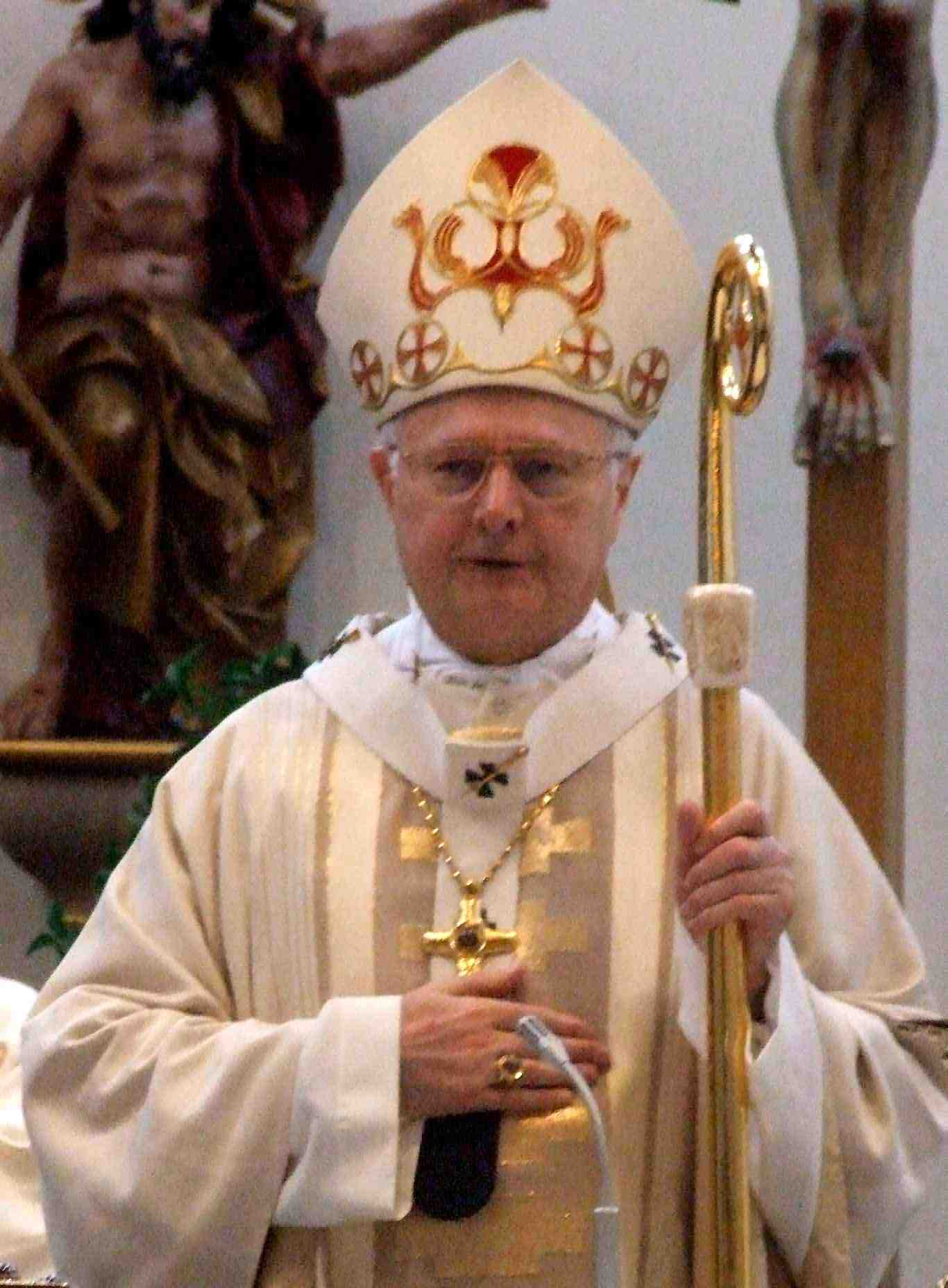 Robert Zollitsch, Erzbischof der Erzdiözese Freiburg und Vorsitzender der deutschen Bischofskonferenz